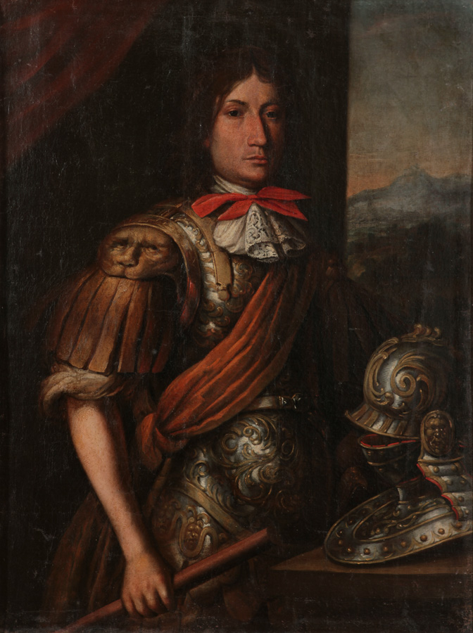 Беларуская (тарашкевіца): Партрэт Марцыяна Аляксандра Агінскага (Marcyjan Alaksandar Aginski)